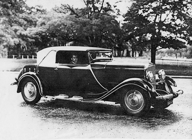 Panhard Cabrio-Coupé - vers 1930 carrossé par Pourtout